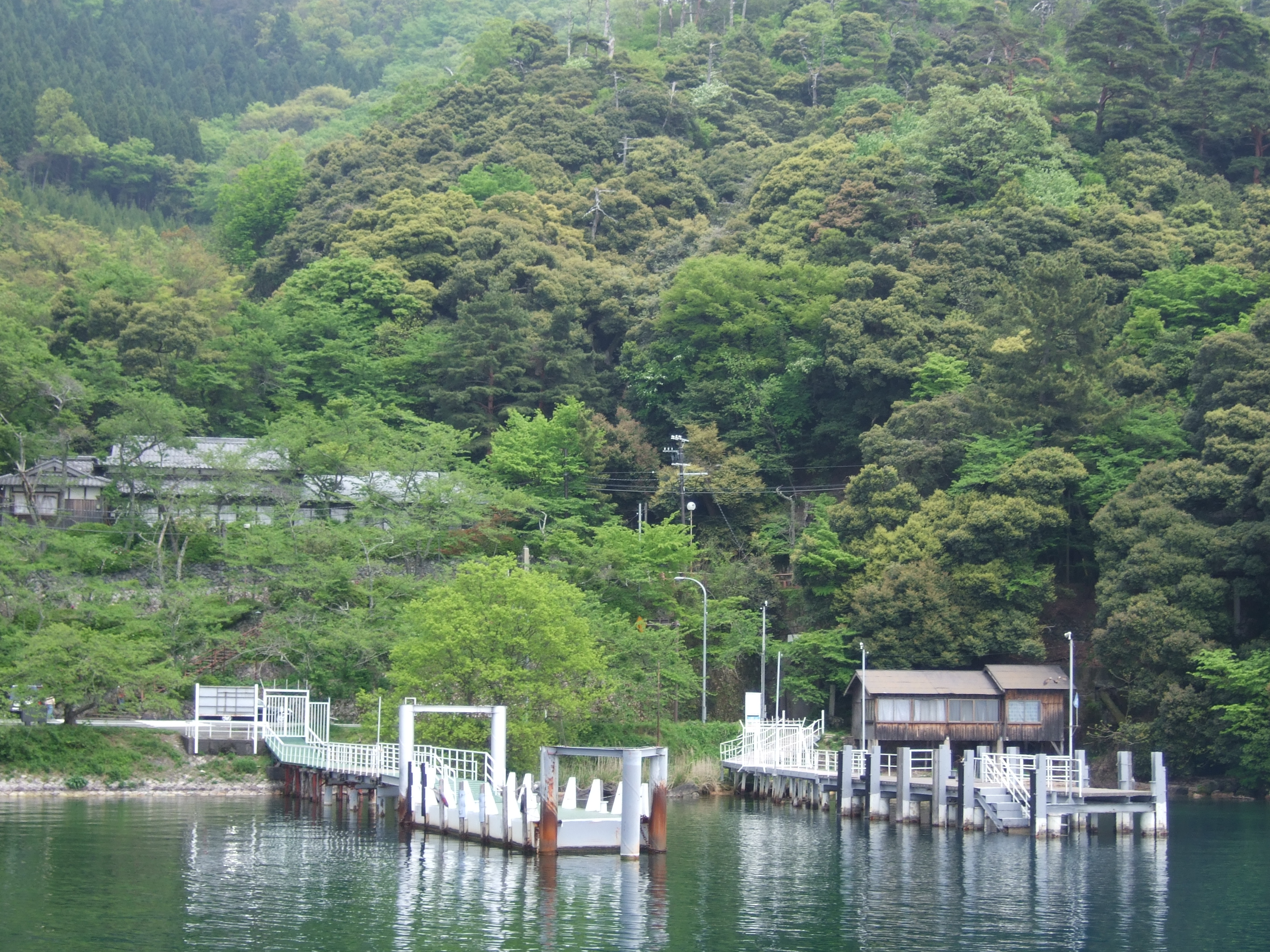 琵琶湖海津大崎